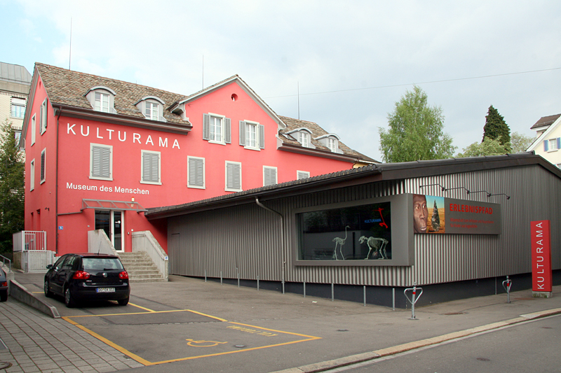 Kulturama - Museum des Menschen in Zürich-Hottingen